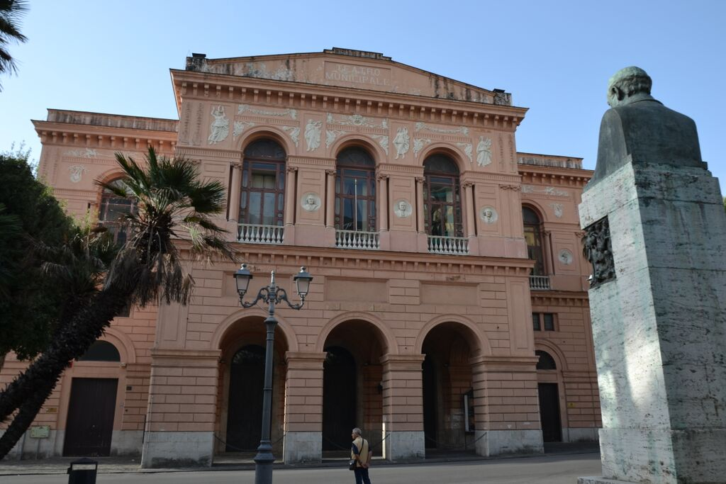 Facciata teatro Verdi di Salerno